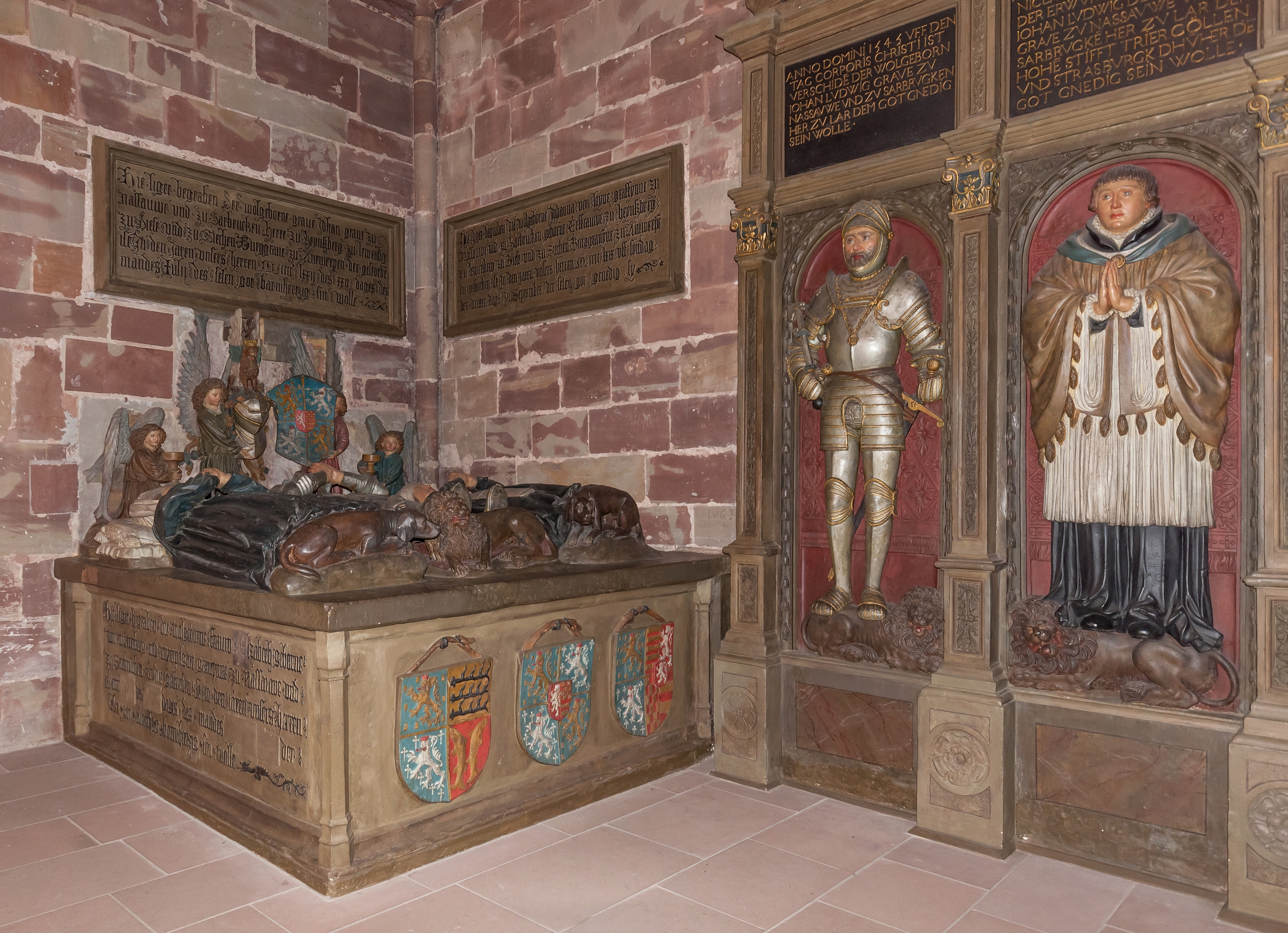 Grabmäler im Seitenschiff der Stiftskirche St. Arnual, Saarbrücken.